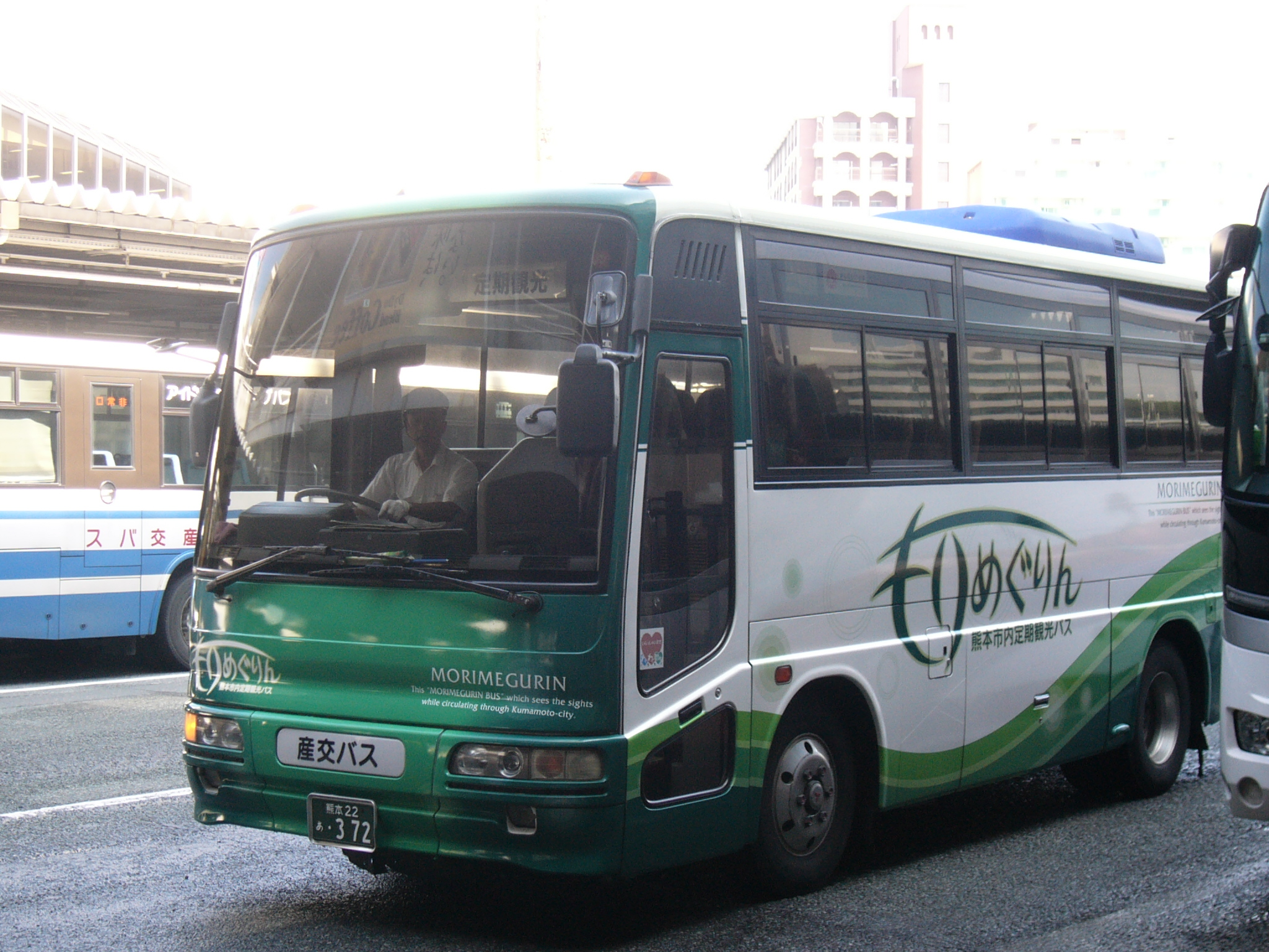 事業者：産交バス 所属：熊本営業所 登録番号：熊本22あ・372 車種：三菱ふそう・エアロミディMJ 撮影地：熊本交通センター